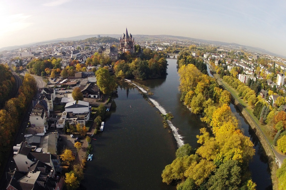 Limburg, aus ca. 30 - 40m Höhe von Osten aus gesehen